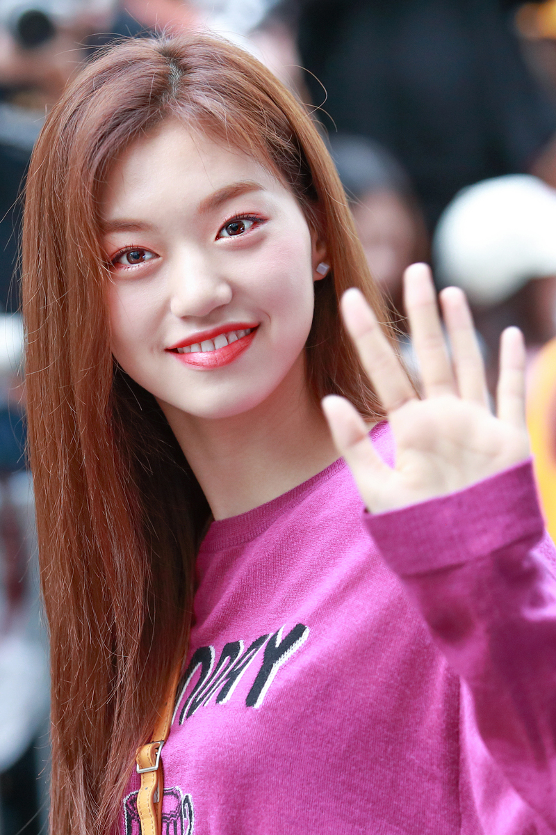 조선말: 170825 위키미키 도연 뮤직뱅크 출근길